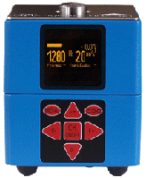 Schwingungskalibrator 16 - 1280 Hz